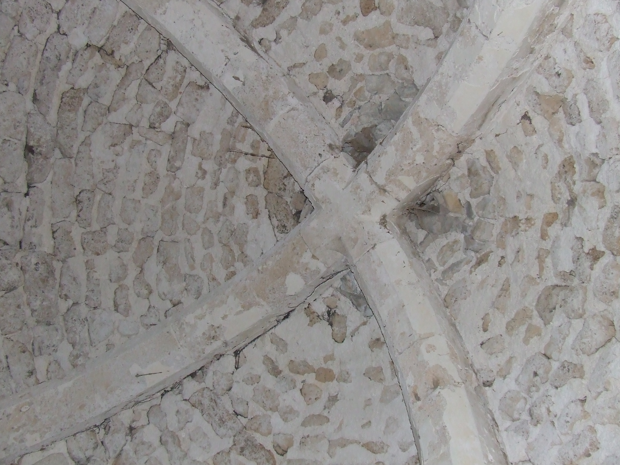 Križno rebrasti obok s sklepnikom v obliki križa, v kupoli romanske rotunde Sv. Mihaela in kostnice na Gorenjem Mokronogu pri Trebelnem na Dolenjskem. Avtorica: Ines Zgonc